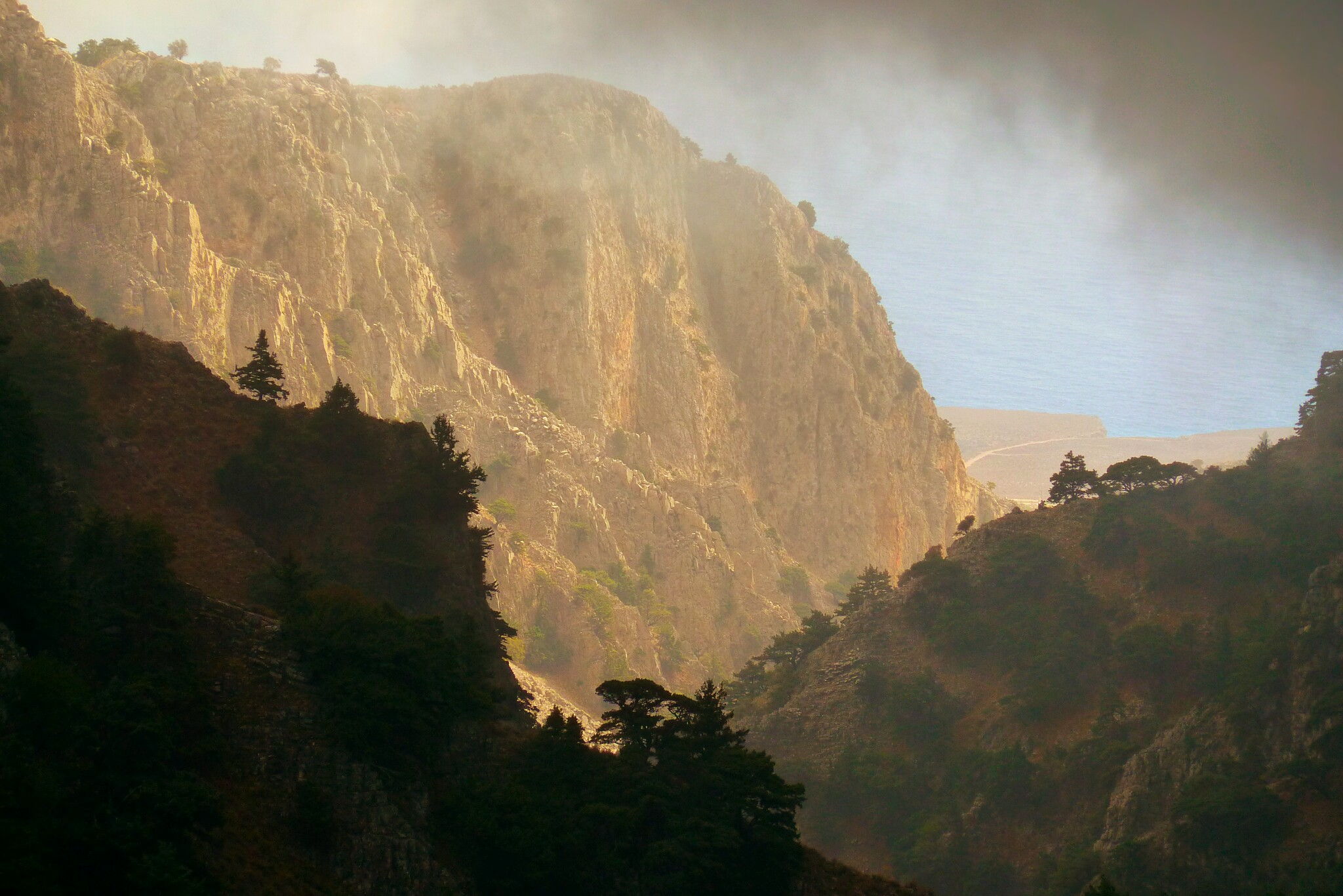 Imbros gorge Crete